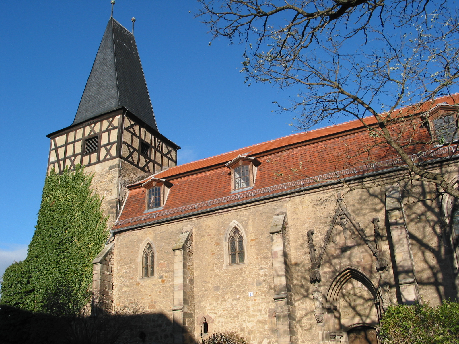 Südansicht der 1281 geweihten evangelischen Pfarrkirche St. Peter und Paul am Klosterweg Oberweimar mit dem Lukardis-Gewölbe im Inneren.